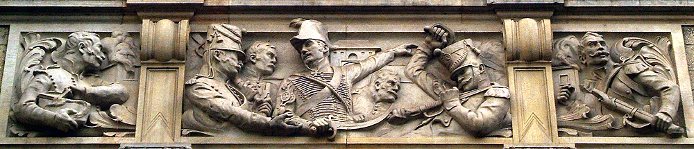 In der Schlacht bei Waterloo verteidigte der Major Georg Freiherr von Baring durch die Königlich-deutsche Legion 1815 den Hof von La Haye Sainte gegen die Einnahme des Hofes durch napoleonische Truppen; als Teil des halbplastischen Geschichts- oder auch "Bilderfrieses" am Neuen Rathaus in Hannover verewigte der Bildhauer Werner Hantelmann das Thema ...